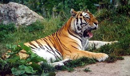 Sibirischer Tiger